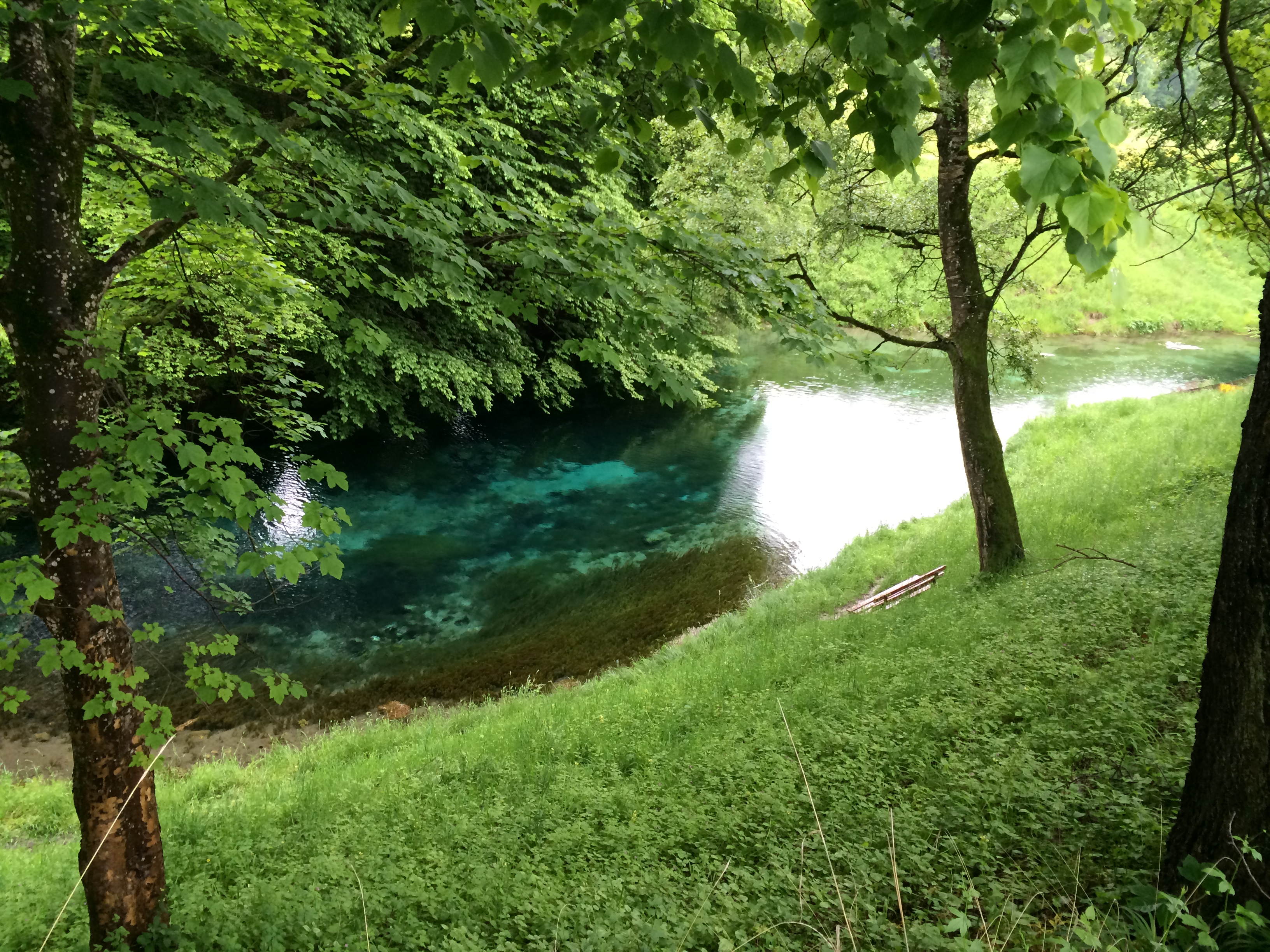 Bild der Blauen Quelle in Erl, Tirol This media shows the natural monument in the Tyrol with the ID ND_5_1.